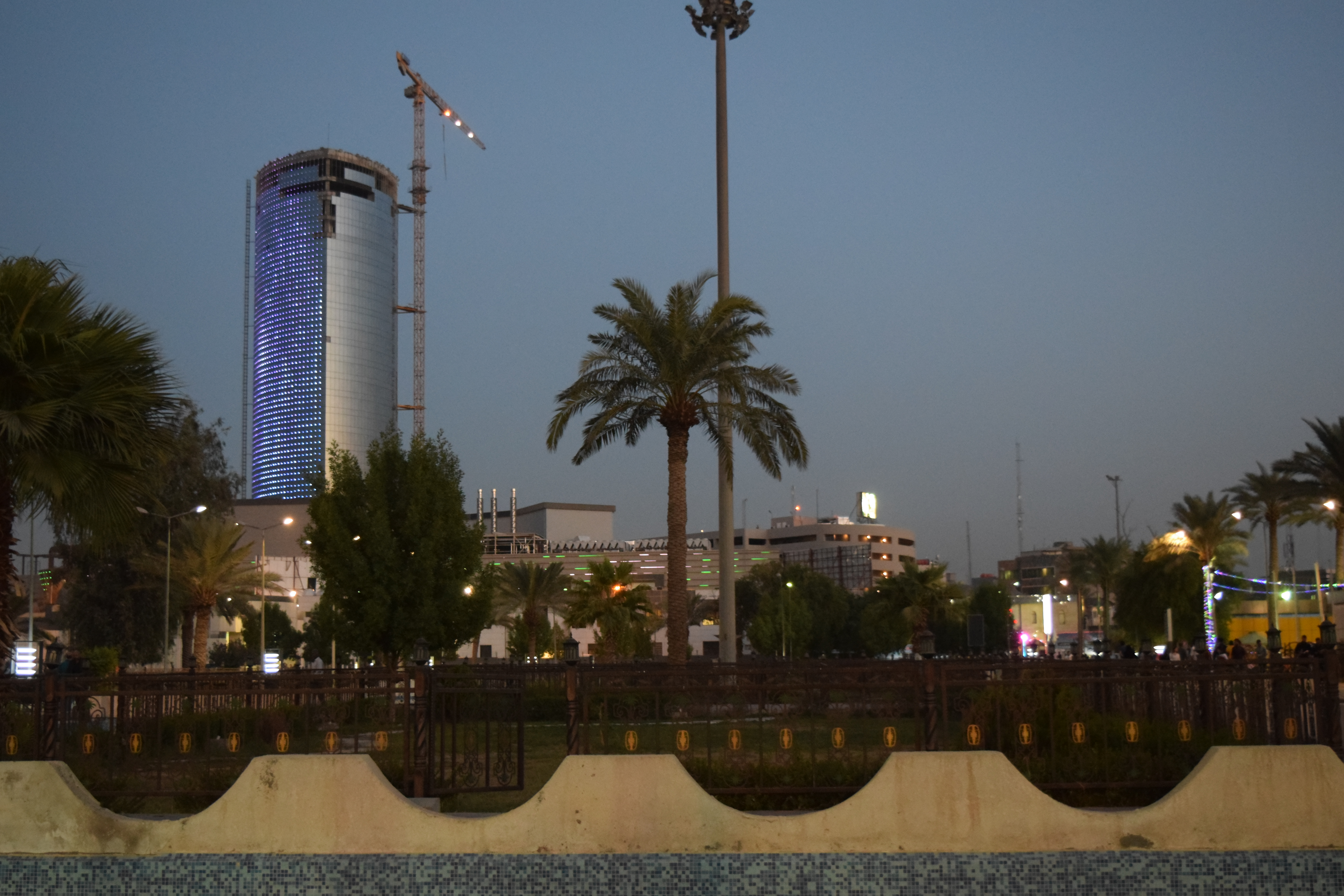 صورة لبغداد مول وفندق بغداد ريحان من روتانا في منطقة الحارثية، التقط الصورة من أرض معرض بغداد الدولي.